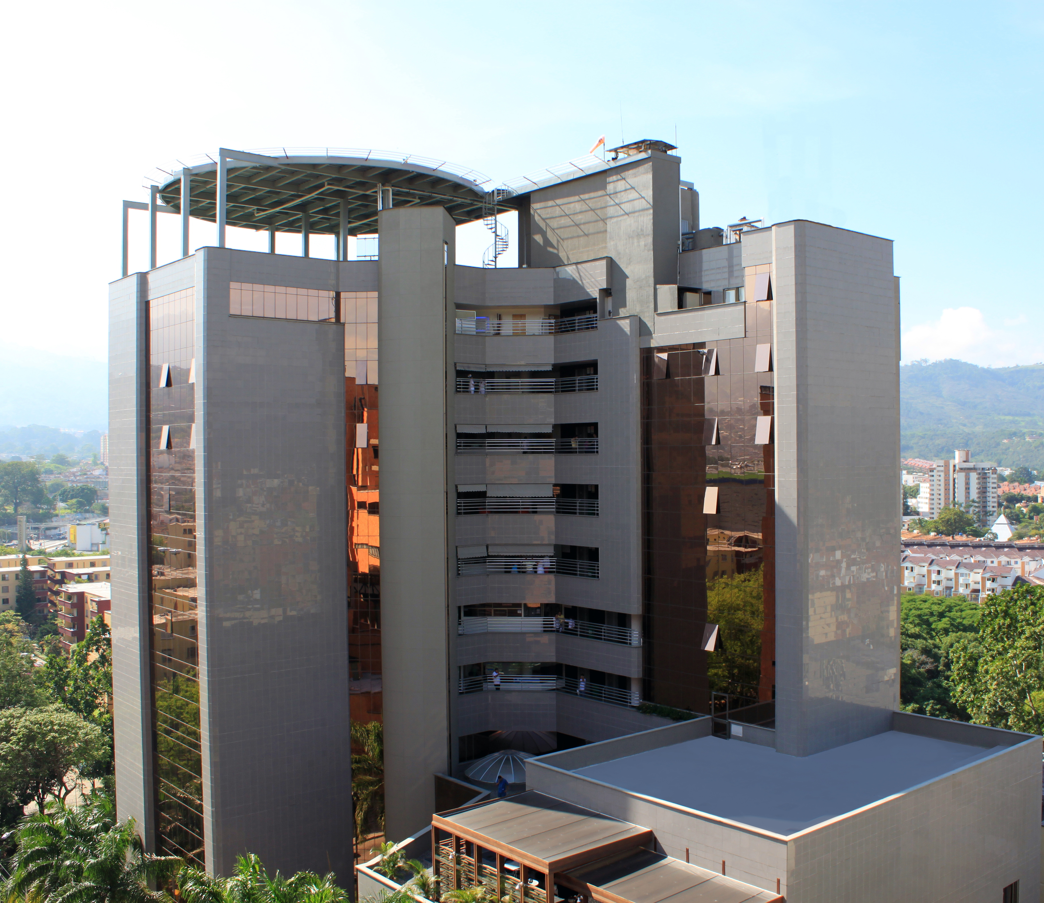 Fachada del Instituto del Corazón de la FCV